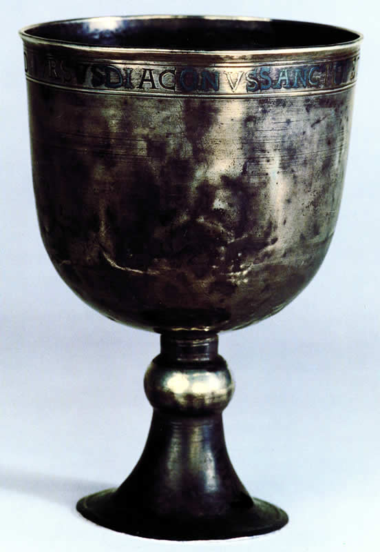 Calice del Diacono Orso. V-VI secolo d.C. Lamon (BL) Italia